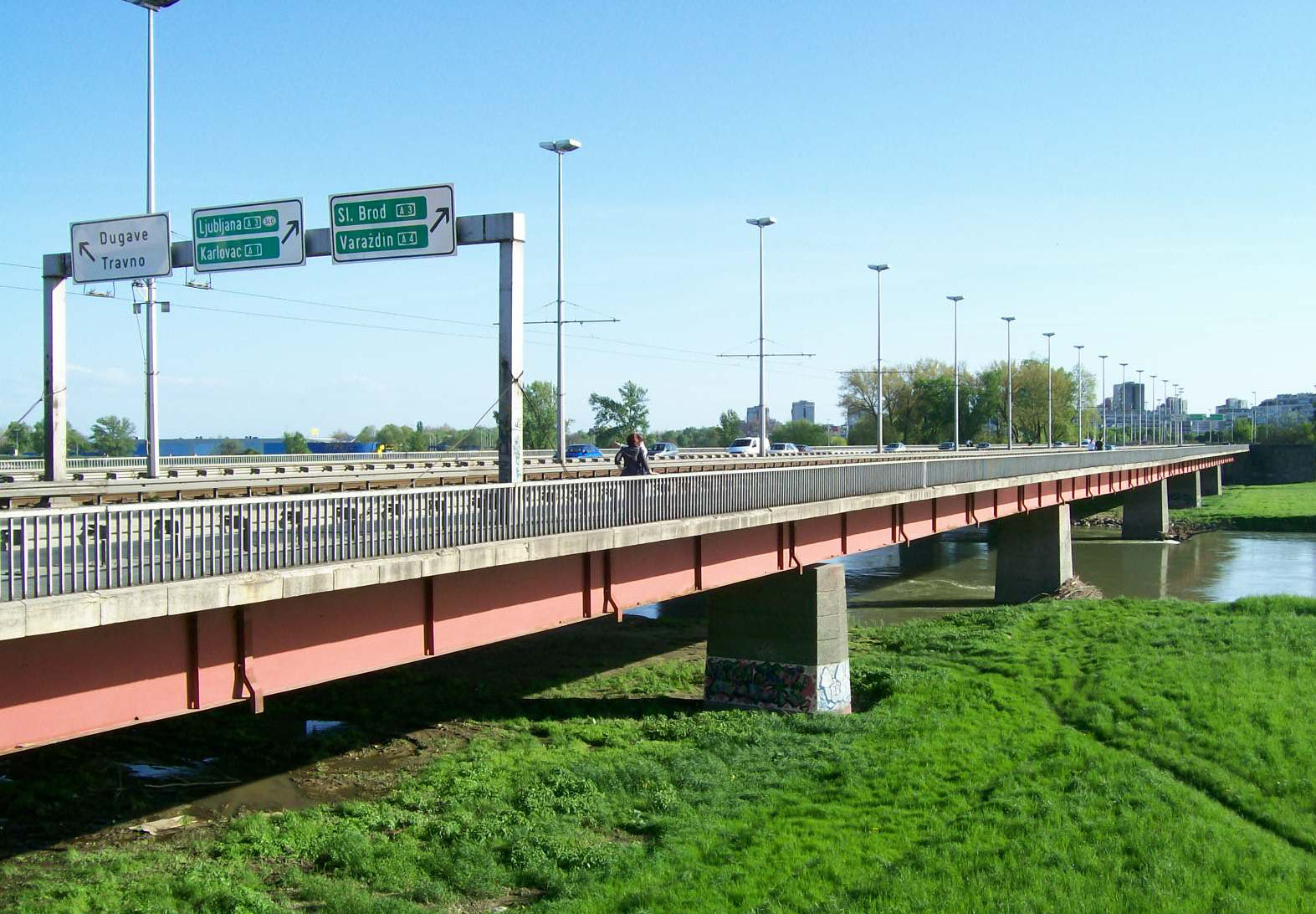 Most mladosti Zagreb